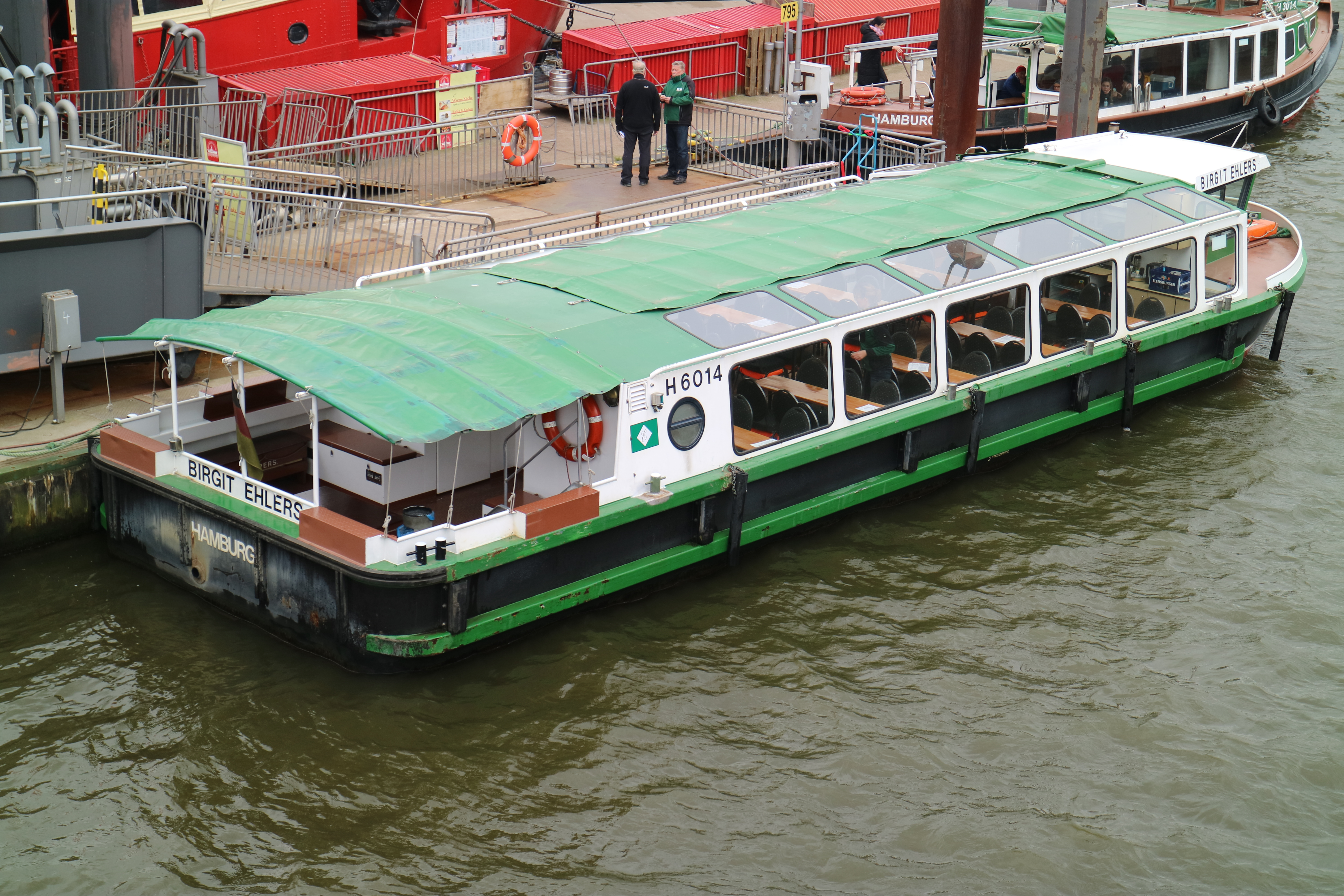 Barkasse Birgit Ehlers im Hamburger Hafen